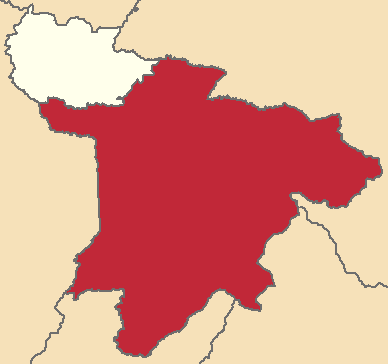 Mapa localizador del cantón en Santo Domingo, Ecuador